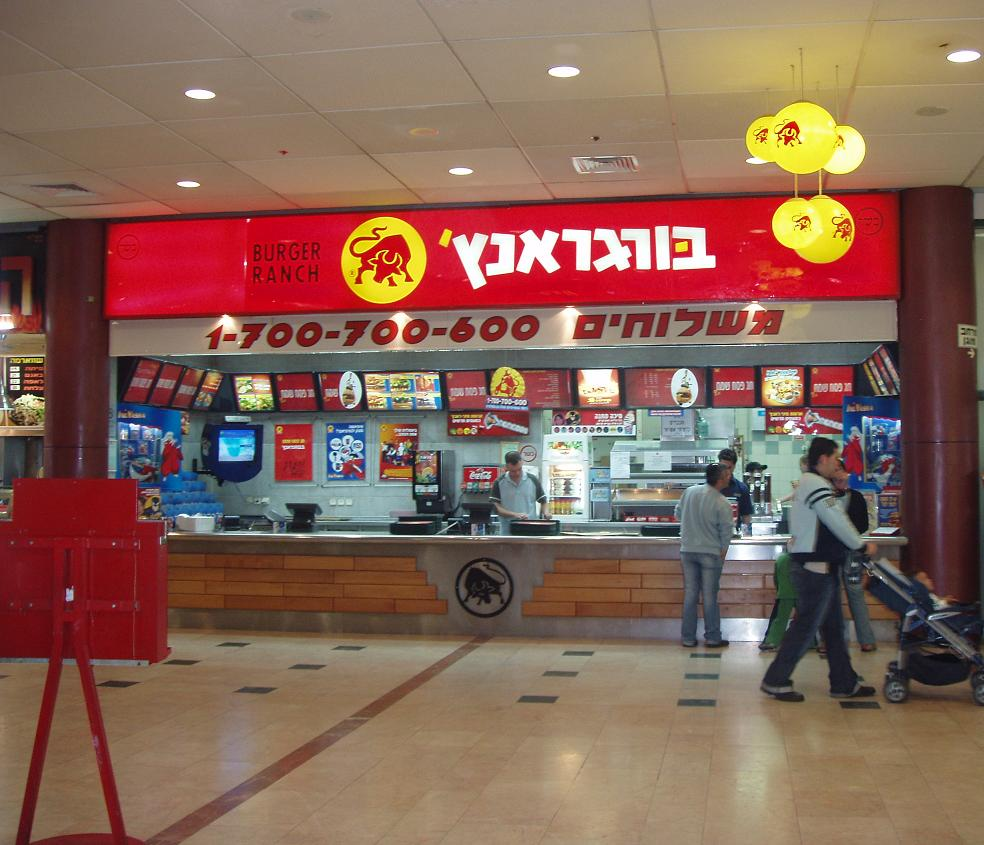 סניף בורגראנץ' באשדוד.